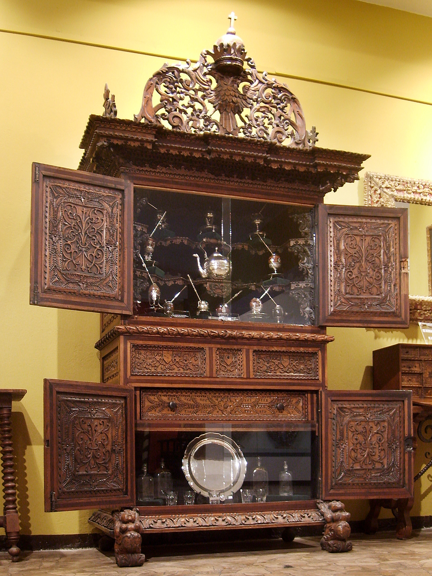 Gabinete colonial que, por tradición, se dice que perteneció a Doña Inés de Suárez. Forma parte de la colección del Museo del Carmen de Maipú, en Santiago de Chile.